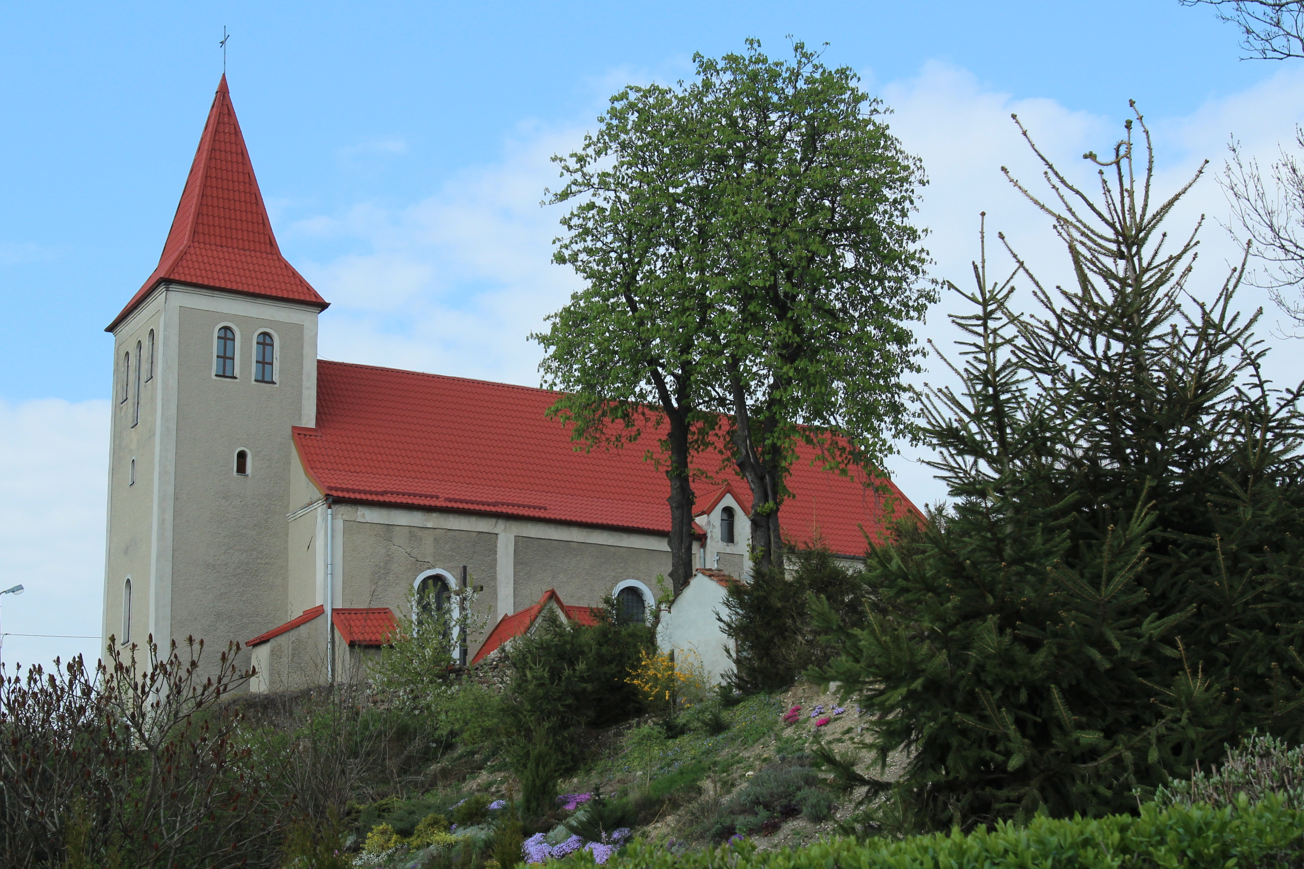 Domaszkowice – rzymskokatolicki kościół parafialny św. Jerzego, XIV, XVII (na cmentarzu par.).